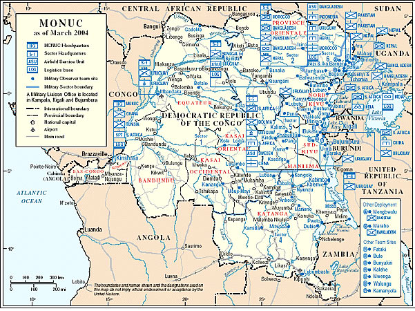 Карта размештаја Мировне мисије у ДР КОнго у оквиру кога је и Санитетски тим Војске Србије у Конгу